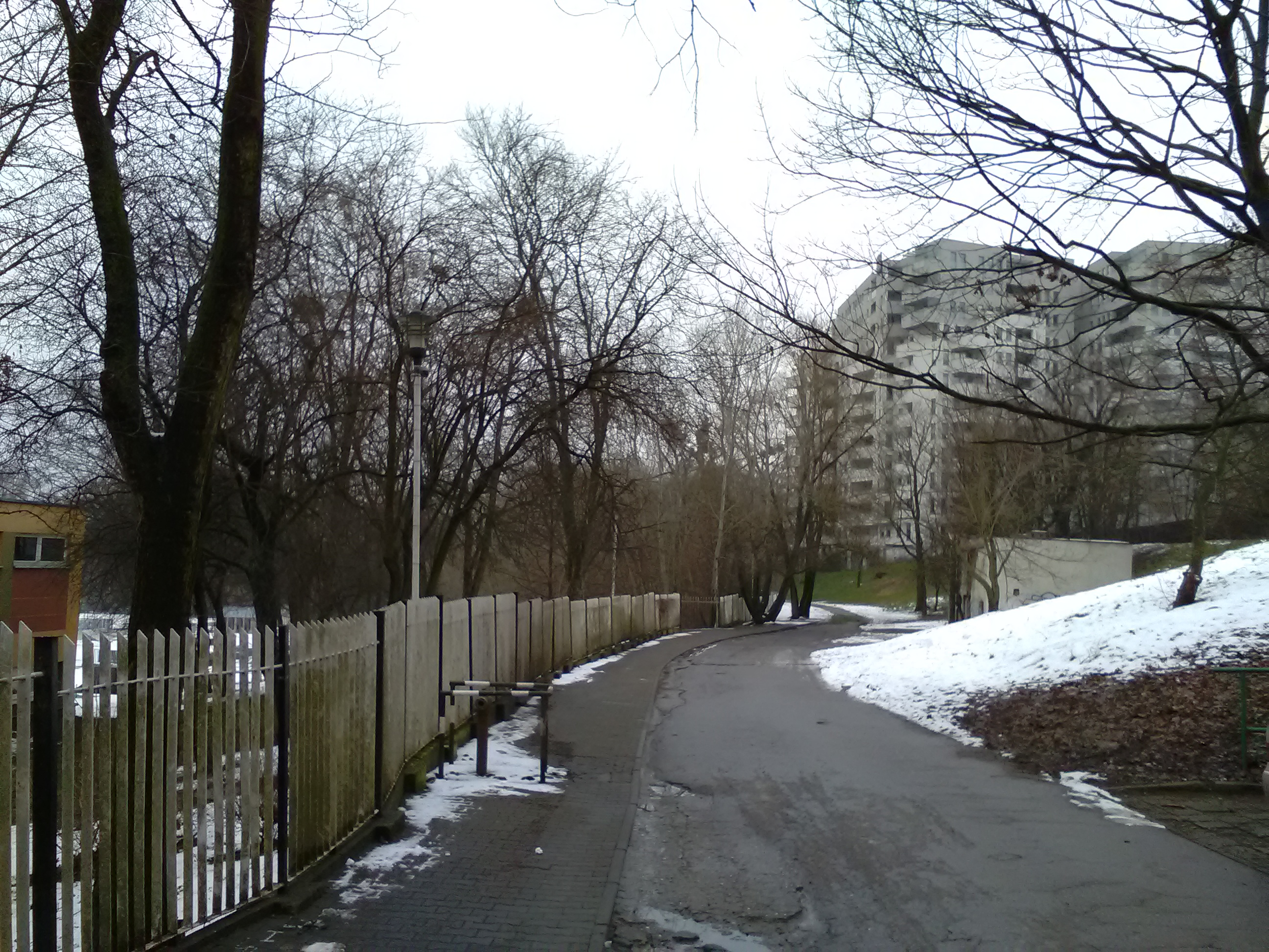 Park nad Wartą w Poznaniu.